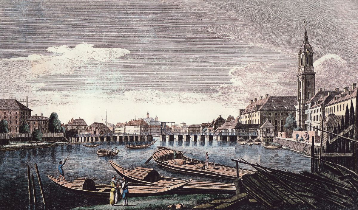 Spree mit Waisenbrücke und Waisenhaus in Berlin, colorierter Kupferstich